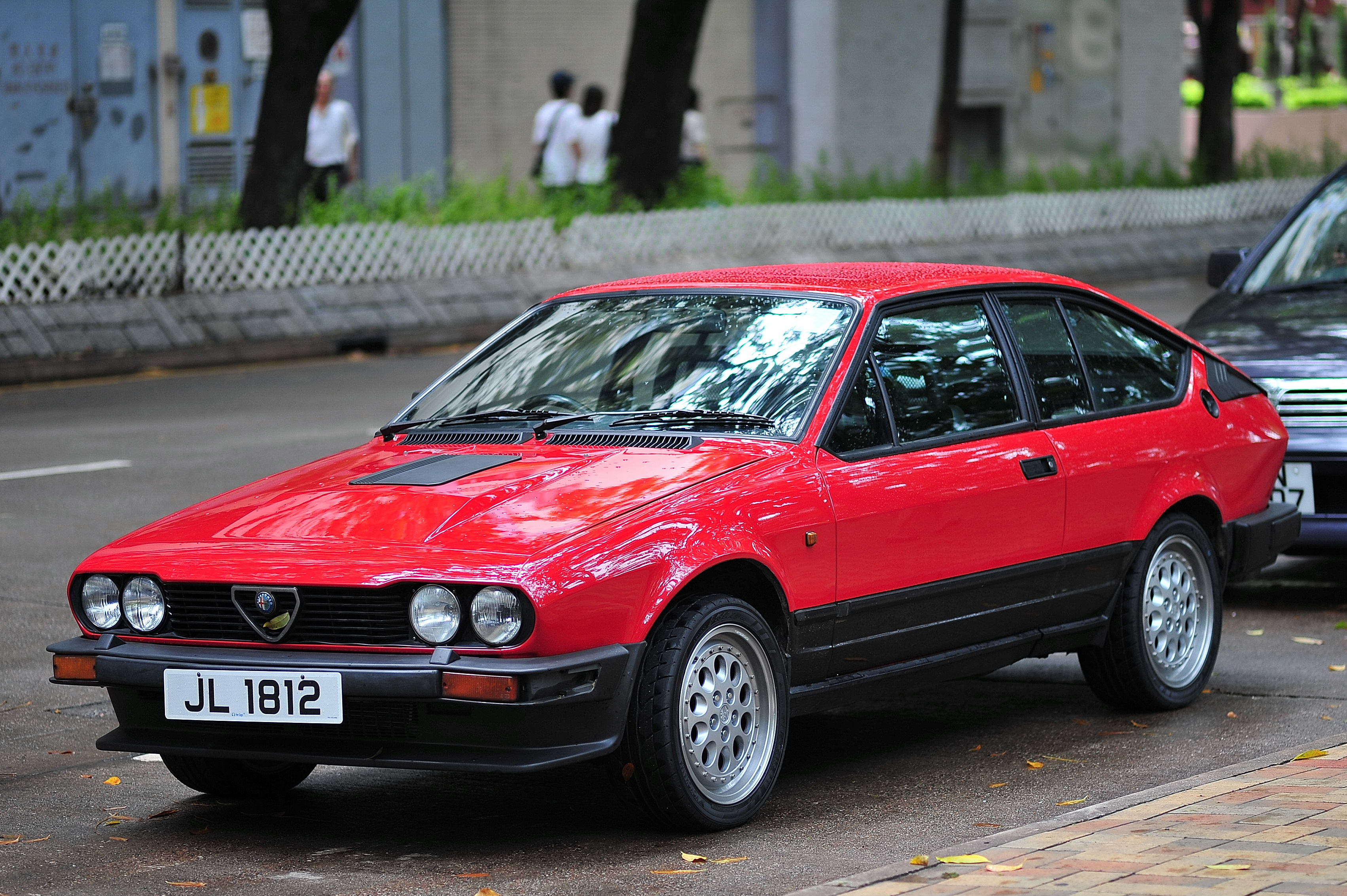 Alfa Romeo GTV6